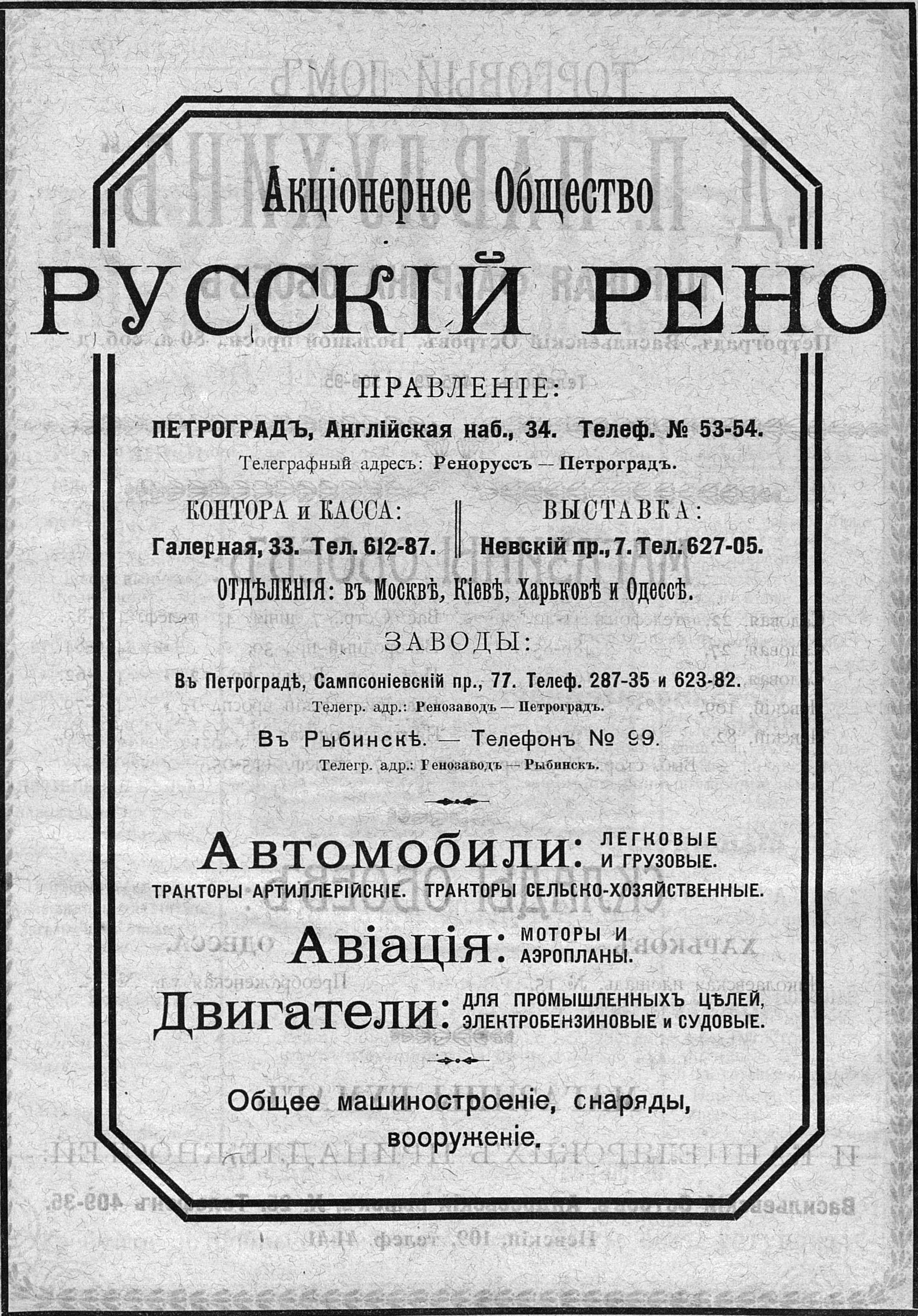 Реклама АО Русский Рено, 1917 год.